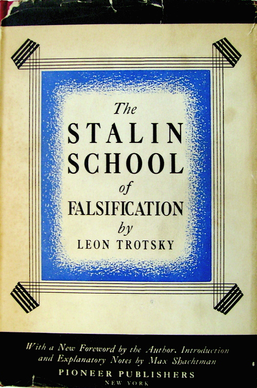 Trotsky - The Stalin school of falsification (cover, 1930)